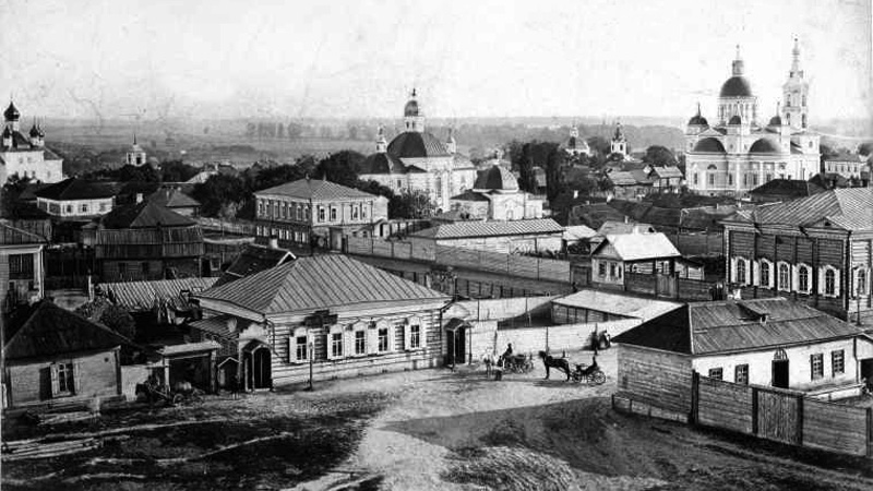 Вид с пожарной каланчи (ныне не существующей, располагавшейся на месте автостоянки с востока от пл. Советской) на Собор Рождества Христова (Казачий полковой Собор), на фото в центре, слева Преображенская церковь, справа Собор Ново - Николаевский. В центре ныне существующий жилой дом (пл.Советская д.5) бывшая контора нотариуса Ленского.